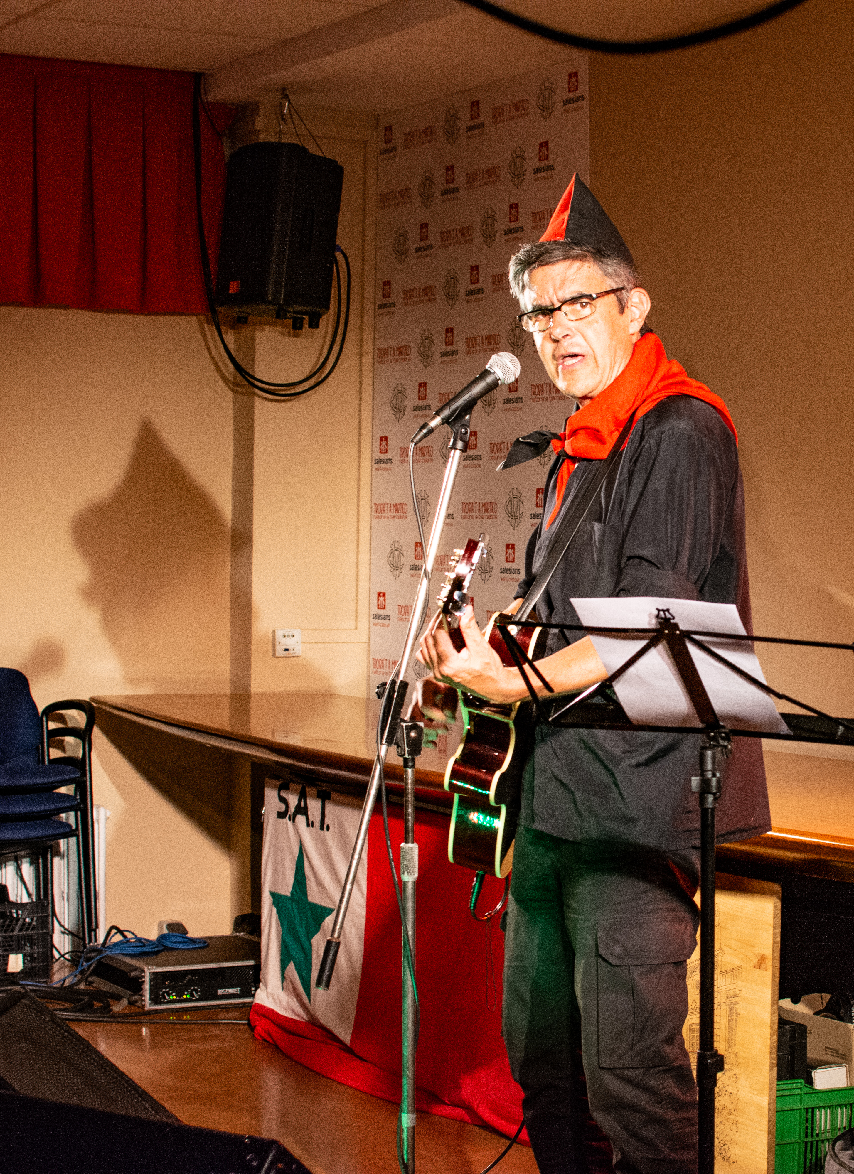 Koncerto de Jomo dum SAT-Kongreso 2019